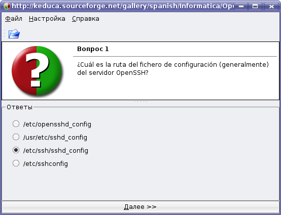 Скриншот KEduca